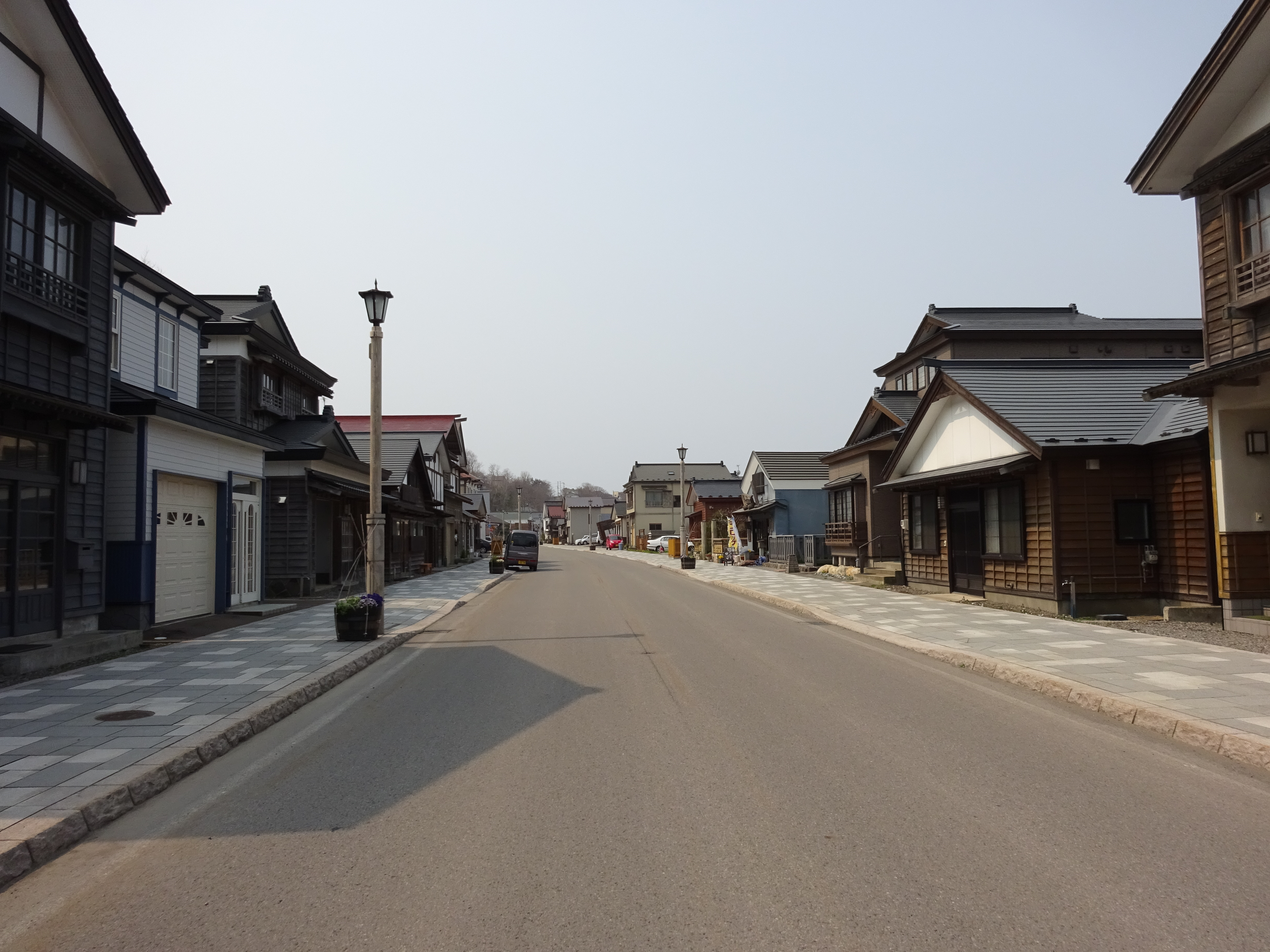 江差・いにしえの街道